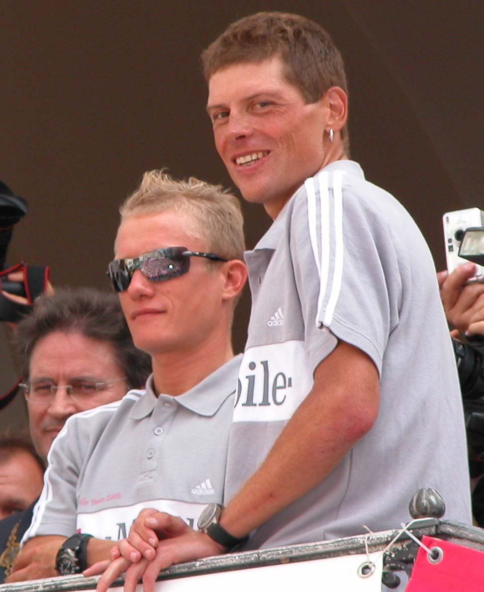 Jan Ullrich mit Alexander Vinokourov beim Tour-de-France-Empfang im Alten Rathaus Bonn